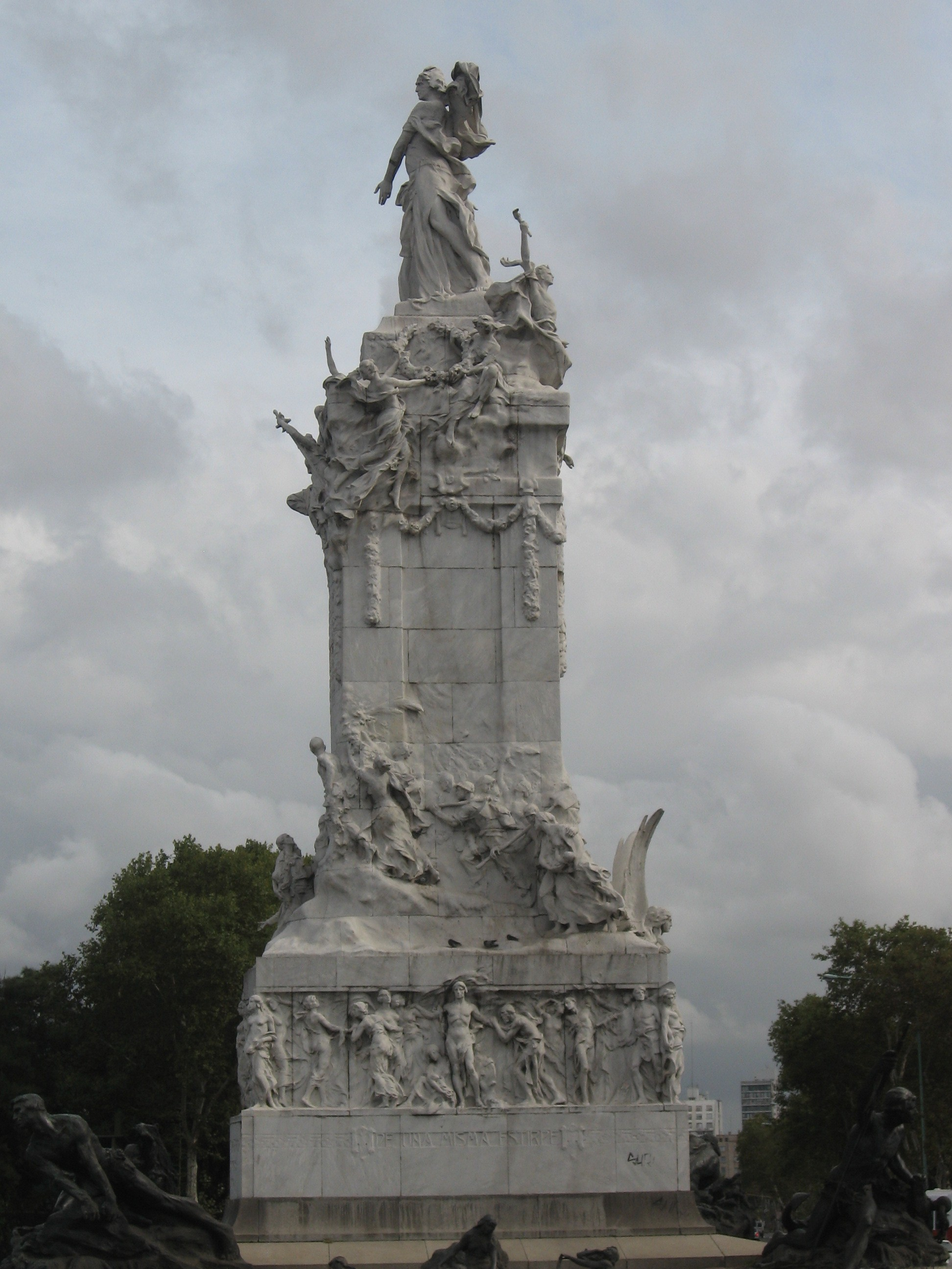 Monumento a La Carta Magna y las Cuatro Regiones Argentinas, conocido popularmente como “De los españoles”. Situado en Sarmiento y Libertador ciudad de Buenos Aires